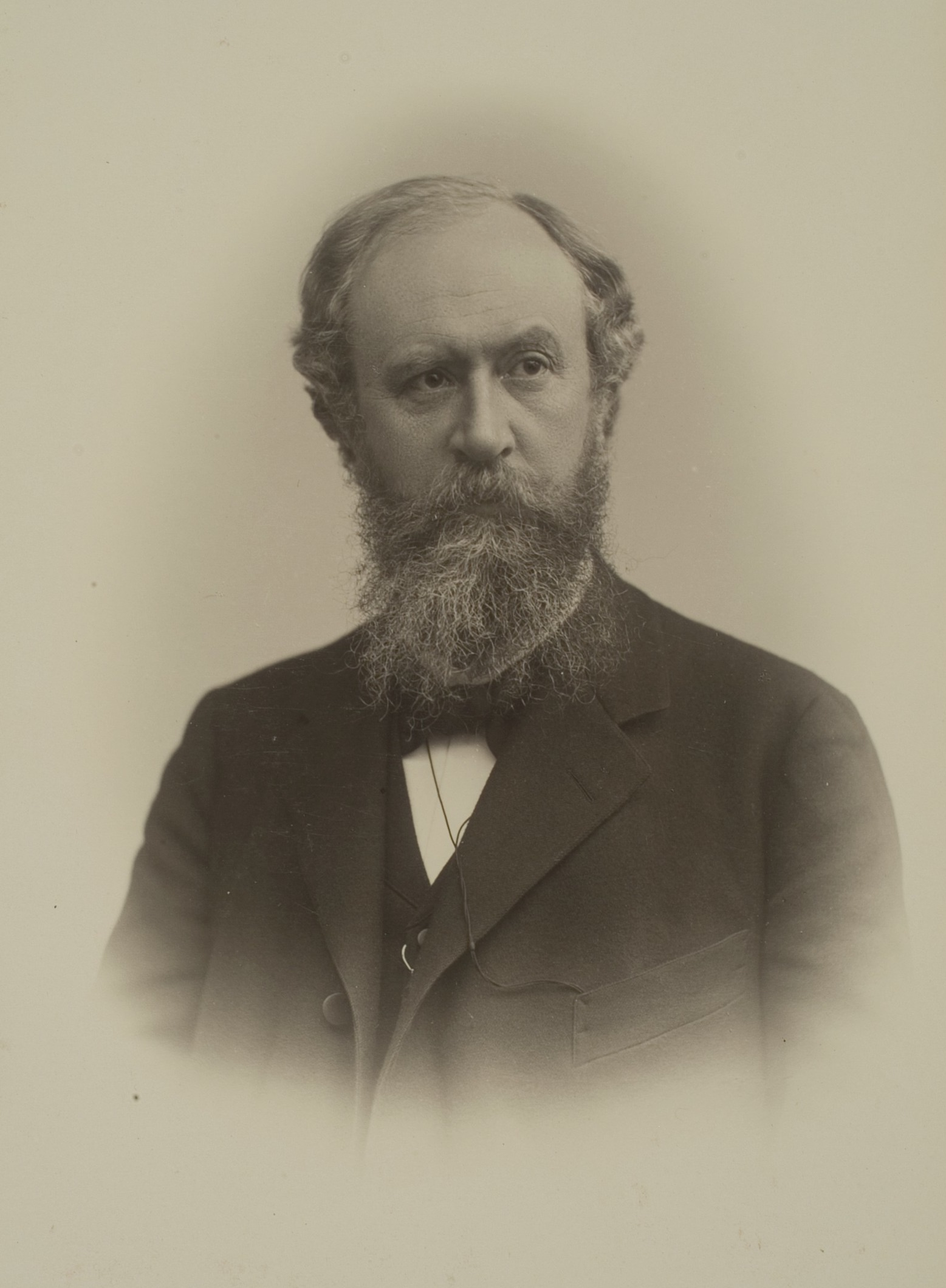 Friedrich Carl von Duhn, Archäologe, 1880–1919 Professor in Heidelberg, seit 1919 Honorarprofessor